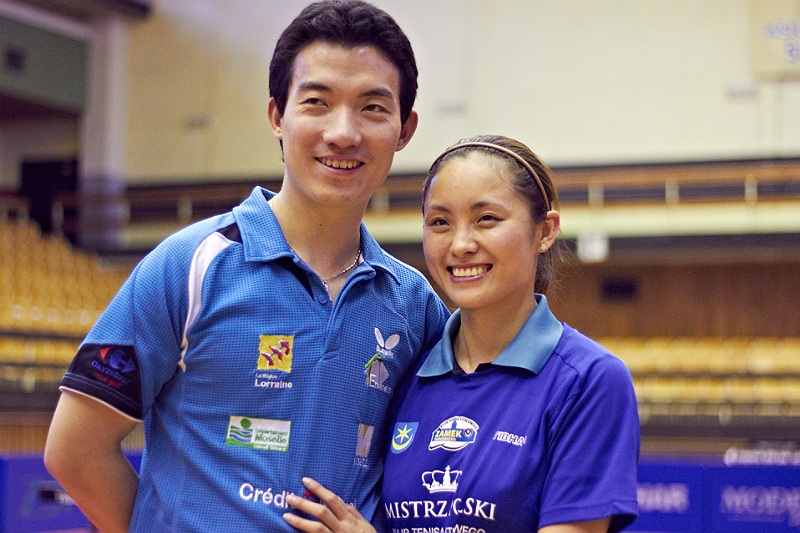 Li Qian z mężem Tian Zi Chao w 2012 roku.